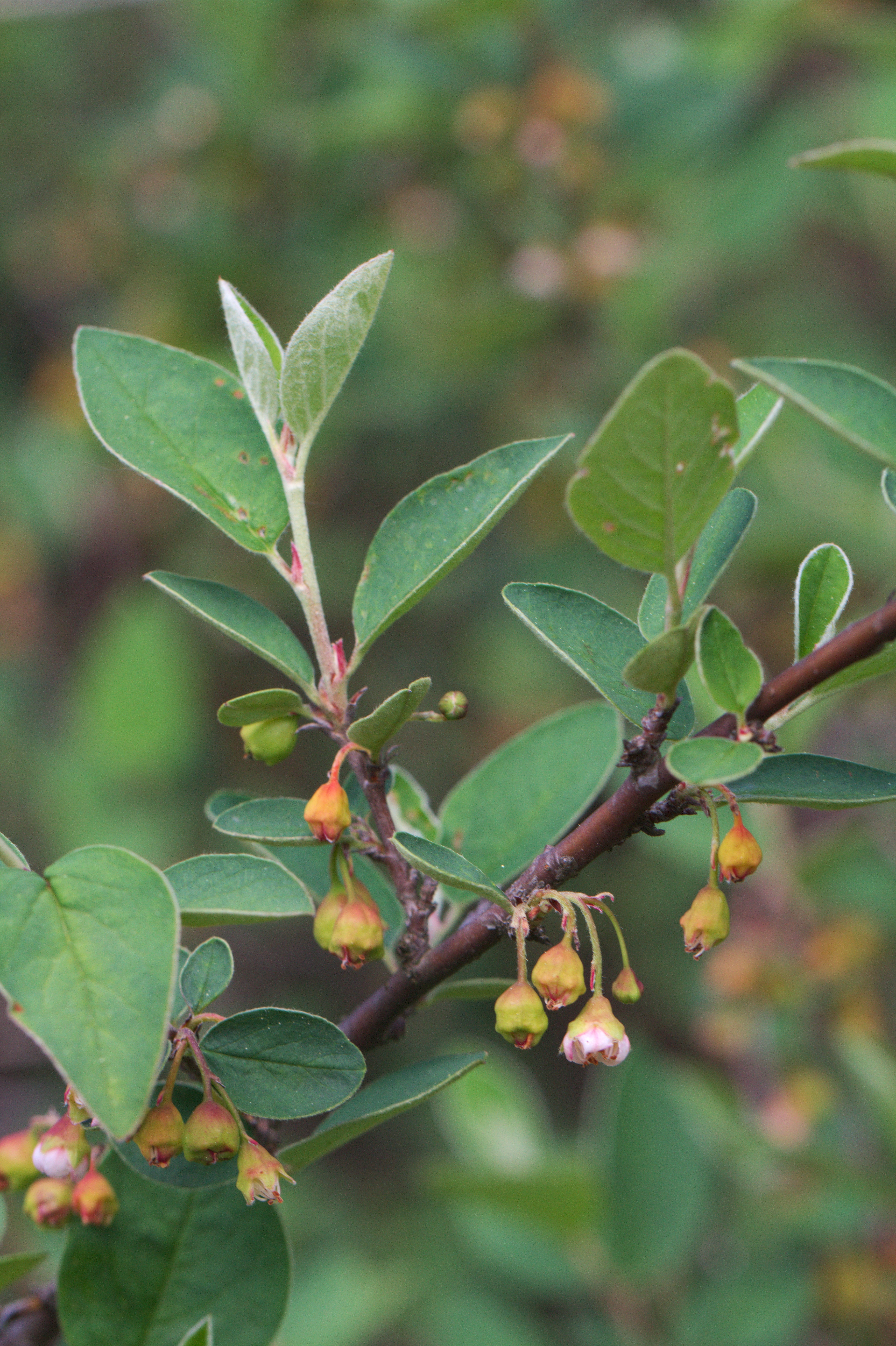 Hlaváčková stráň (přírodní památka) - jaro - Cotoneaster integerrimus Med., skalník celokrajný - status ohrožení v ČR: C4a (vzácnější taxony vyžadující pozornost)